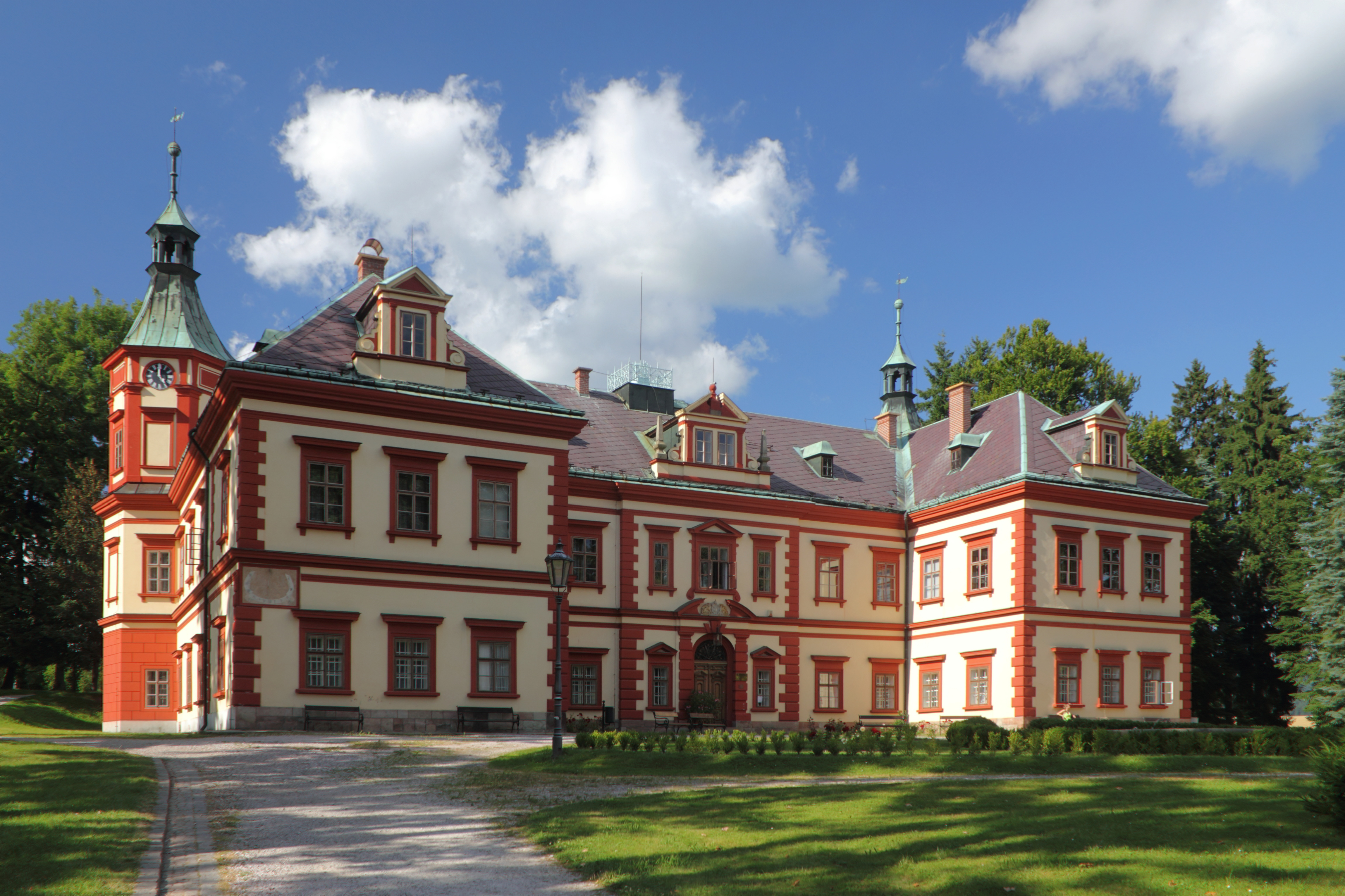 Zámek Jilemnice, Kostelní 75, Jilemnice